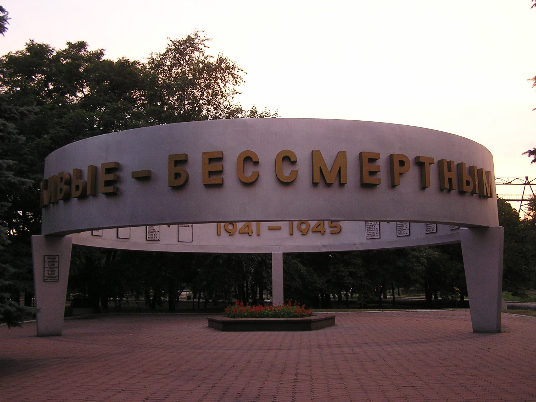 мемориал "Живые - бессмертным"